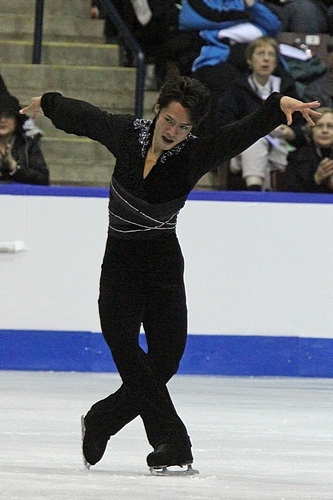 Дайсукэ Такахаси на 2011 Skate Canada International.